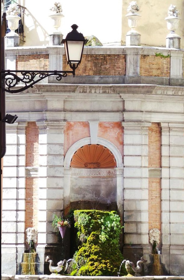 La fontana dei pesci a largo campo Salerno